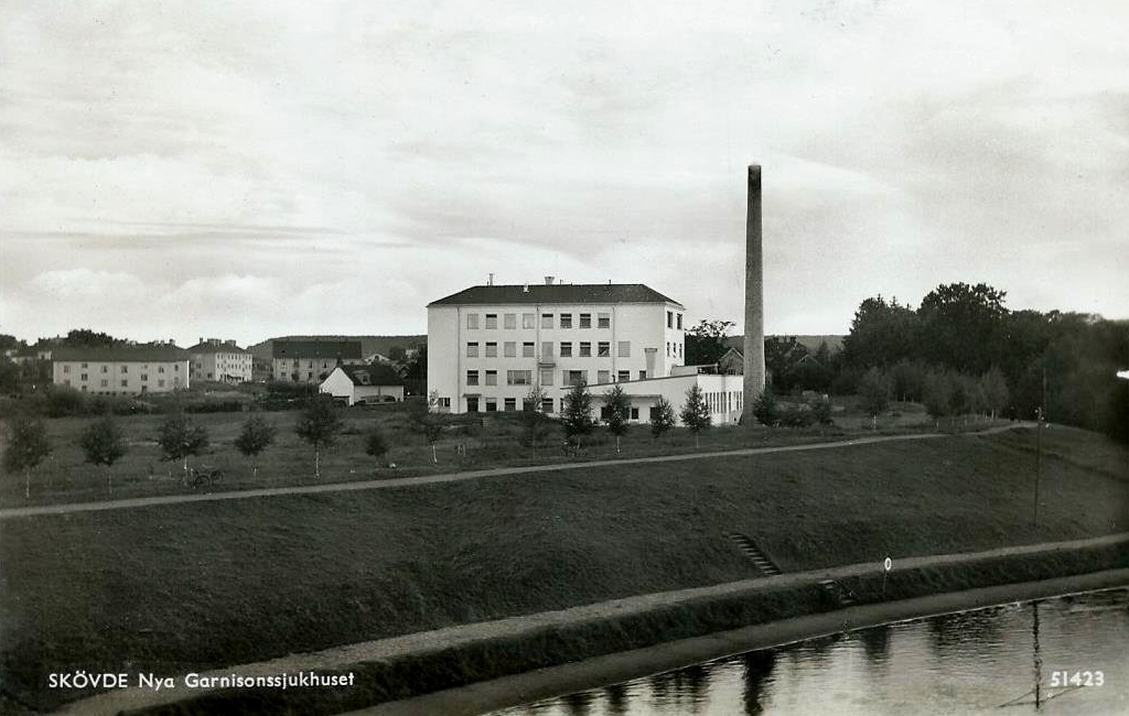 Nya Garnisonssjukhuset i Skövde vid Ekedalsgatan 14.